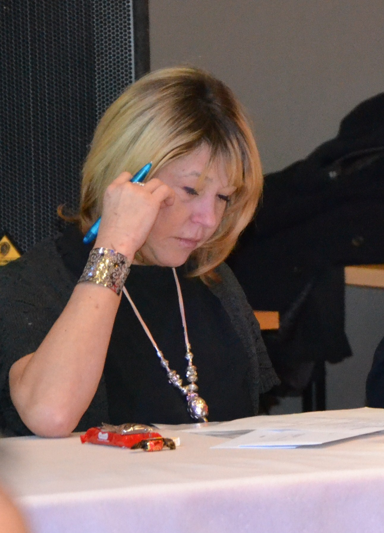 Madame Nathalie Winde, Conseillère communale de Court-Saint-Etienne. Première séance du Conseil, le 3 déc 2012.